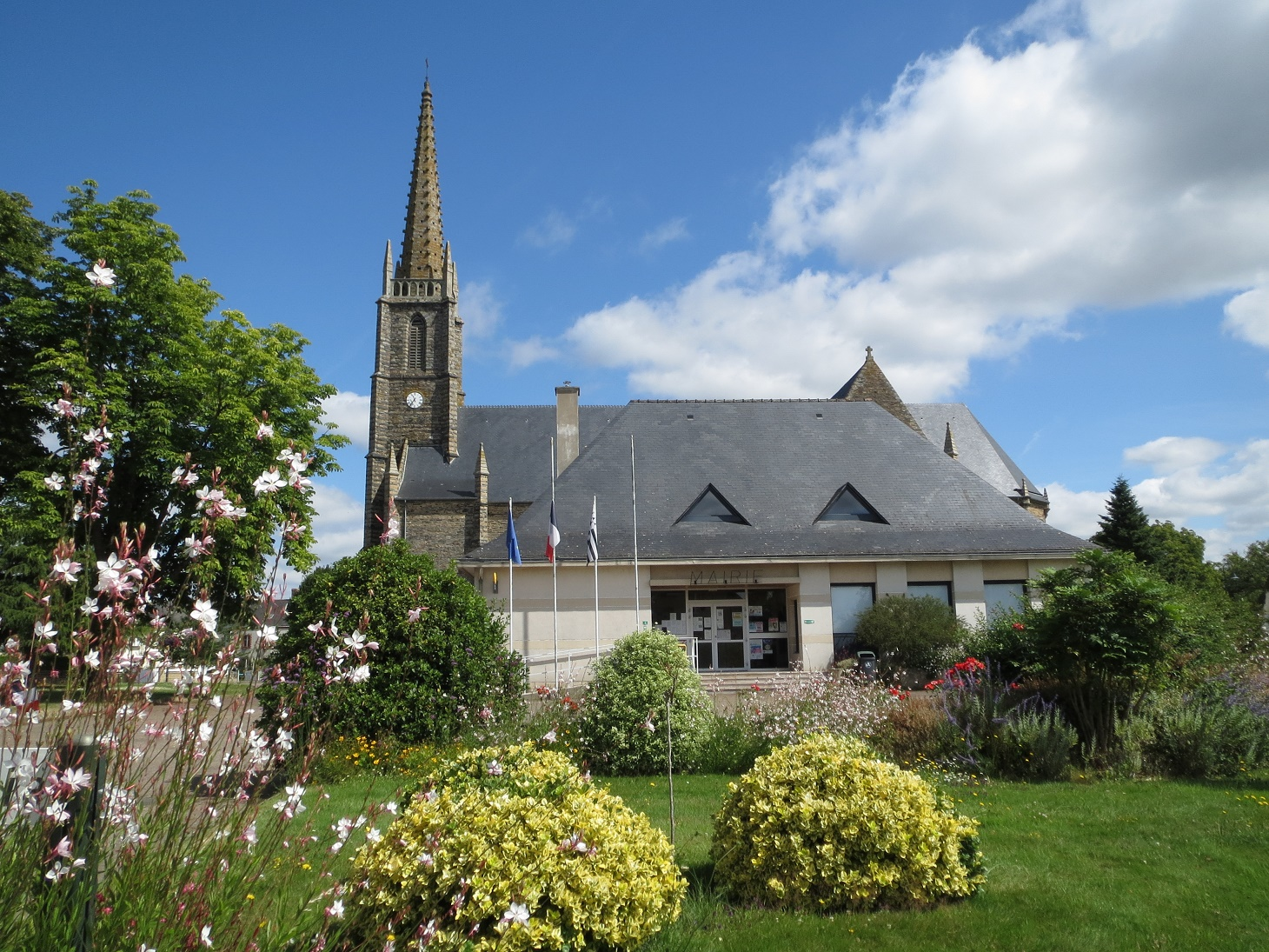 Mairie et église de Sainte-Marie (07-2014)